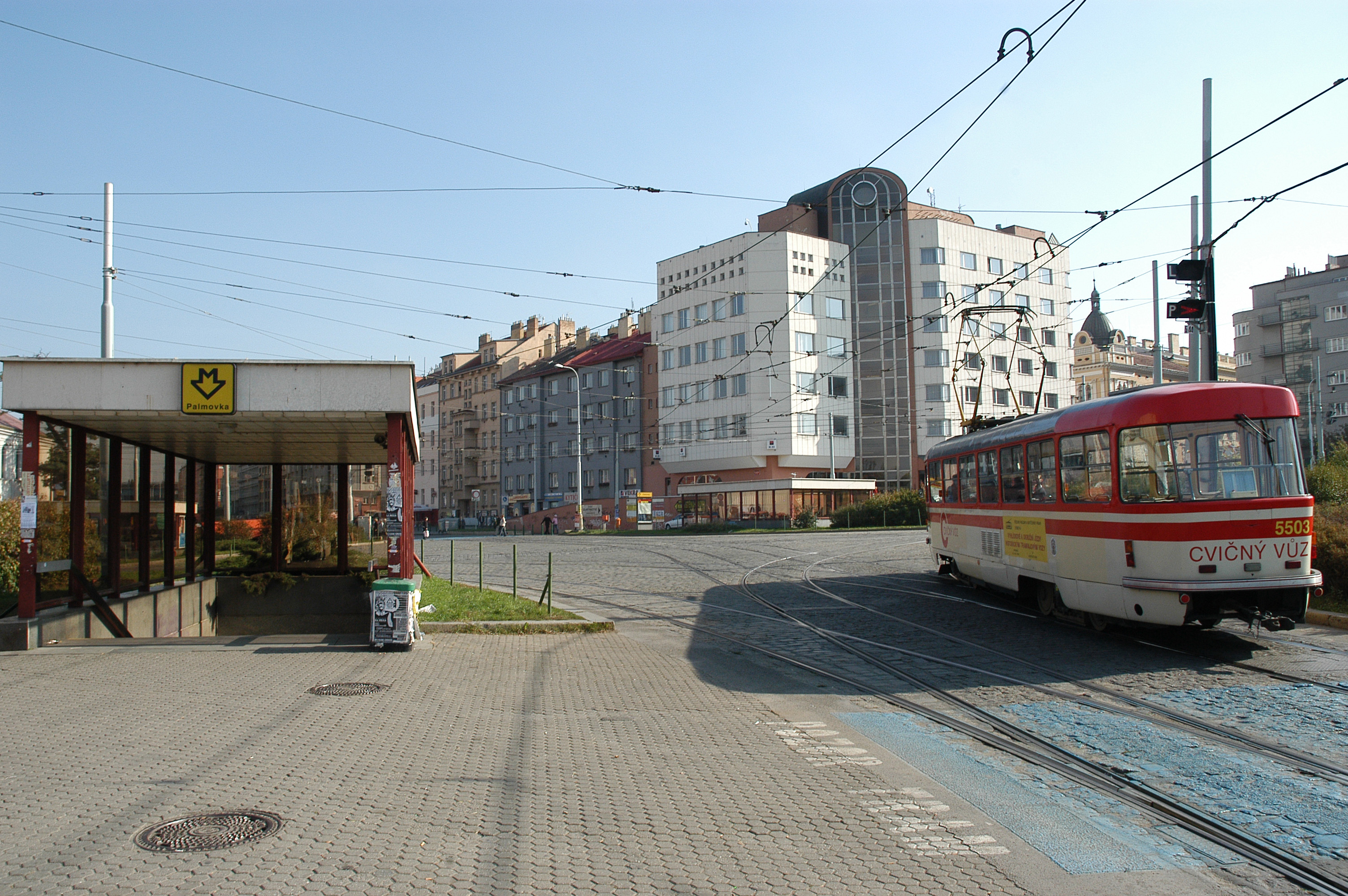 Praha, dolní křižovatka na Palmovce (Libeňský most - Zenklova - Na Žertvách).